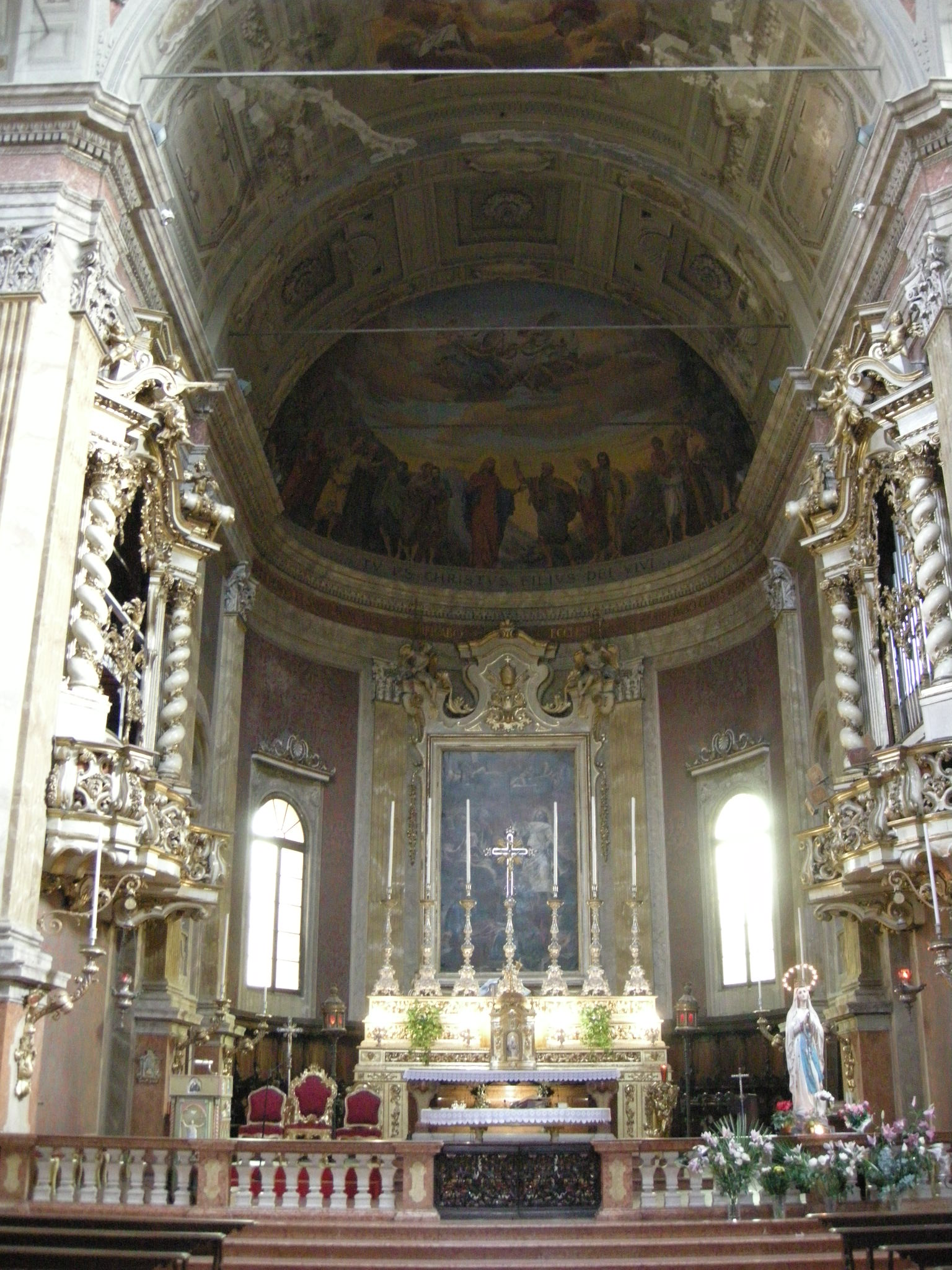 San Pietro (Reggio Emilia)